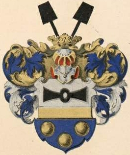 Clodt von Jürgensburgi suguvõsa aadlivapp